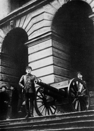 Здание Смольного в феврале 1918 года (Петроград)